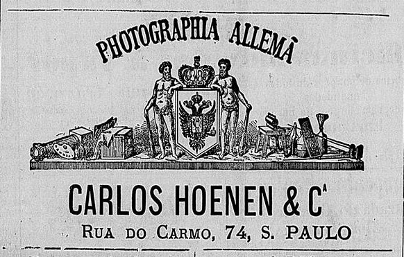 Anúncio publicado no Correio Paulistano em 7 de março de 1877, divulgando o estúdio fotográfico "Photographia Allemã", de propriedade do fotógrafo Carlos Hoenen.